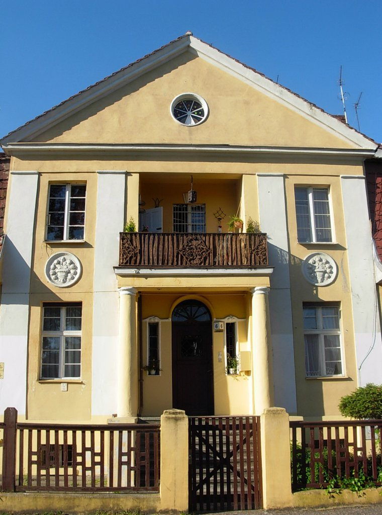 Osiedle Sielanka w Bydgoszczy, dom ul. Wyspiańskiego 6 (1914)